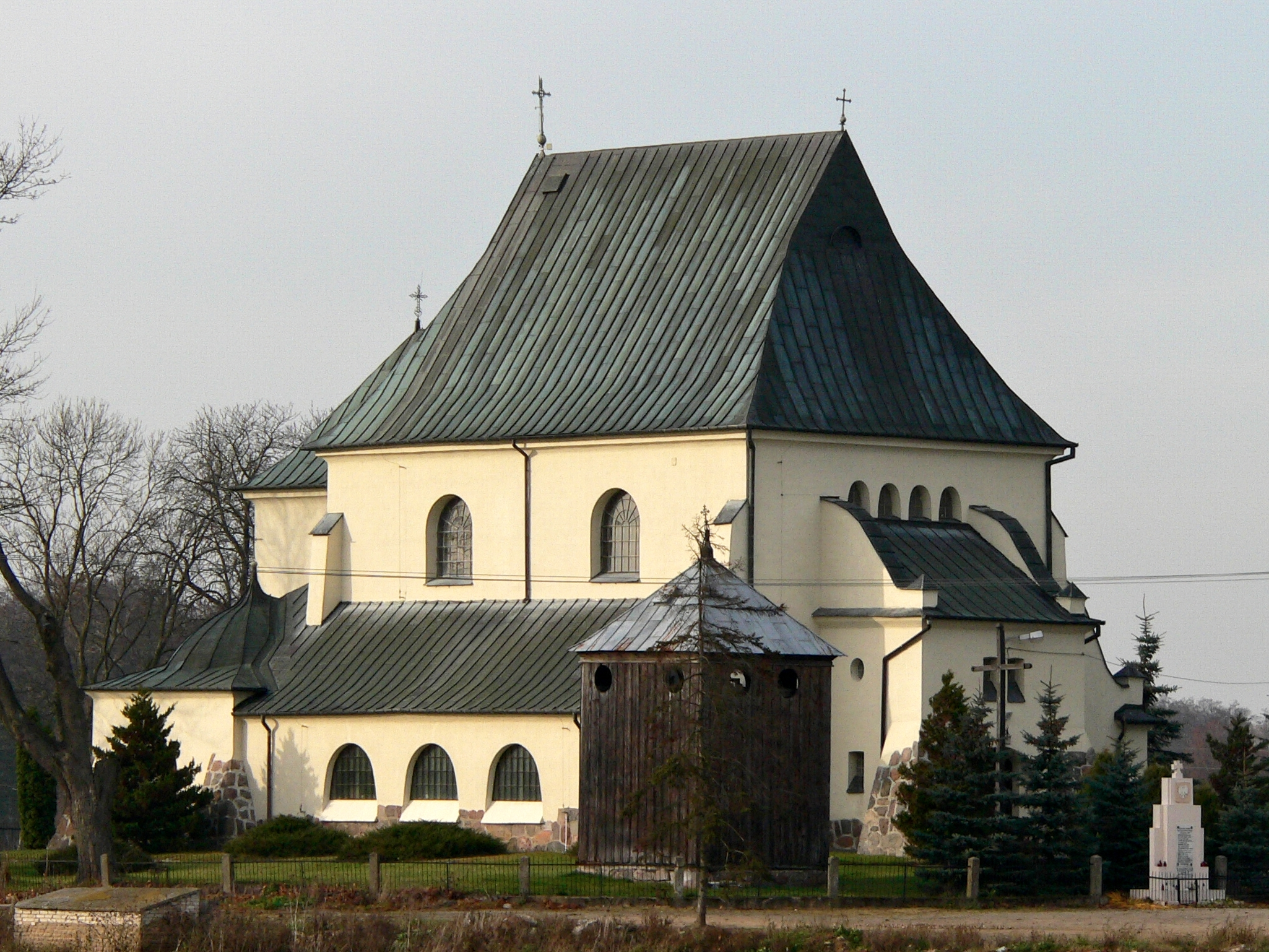 Zagroba - kościół pw. św. Wojciecha.